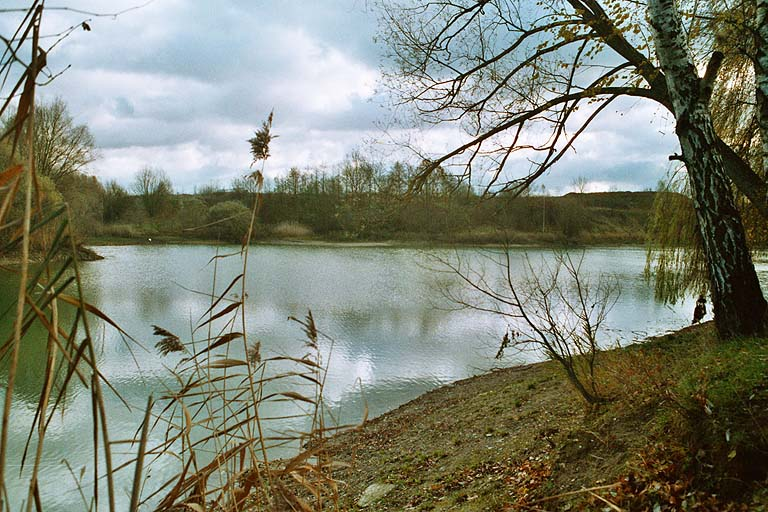 Der Thalersee in Neusäß